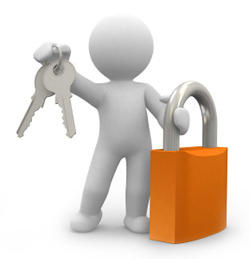 Монгол: Аюулгүй байдал